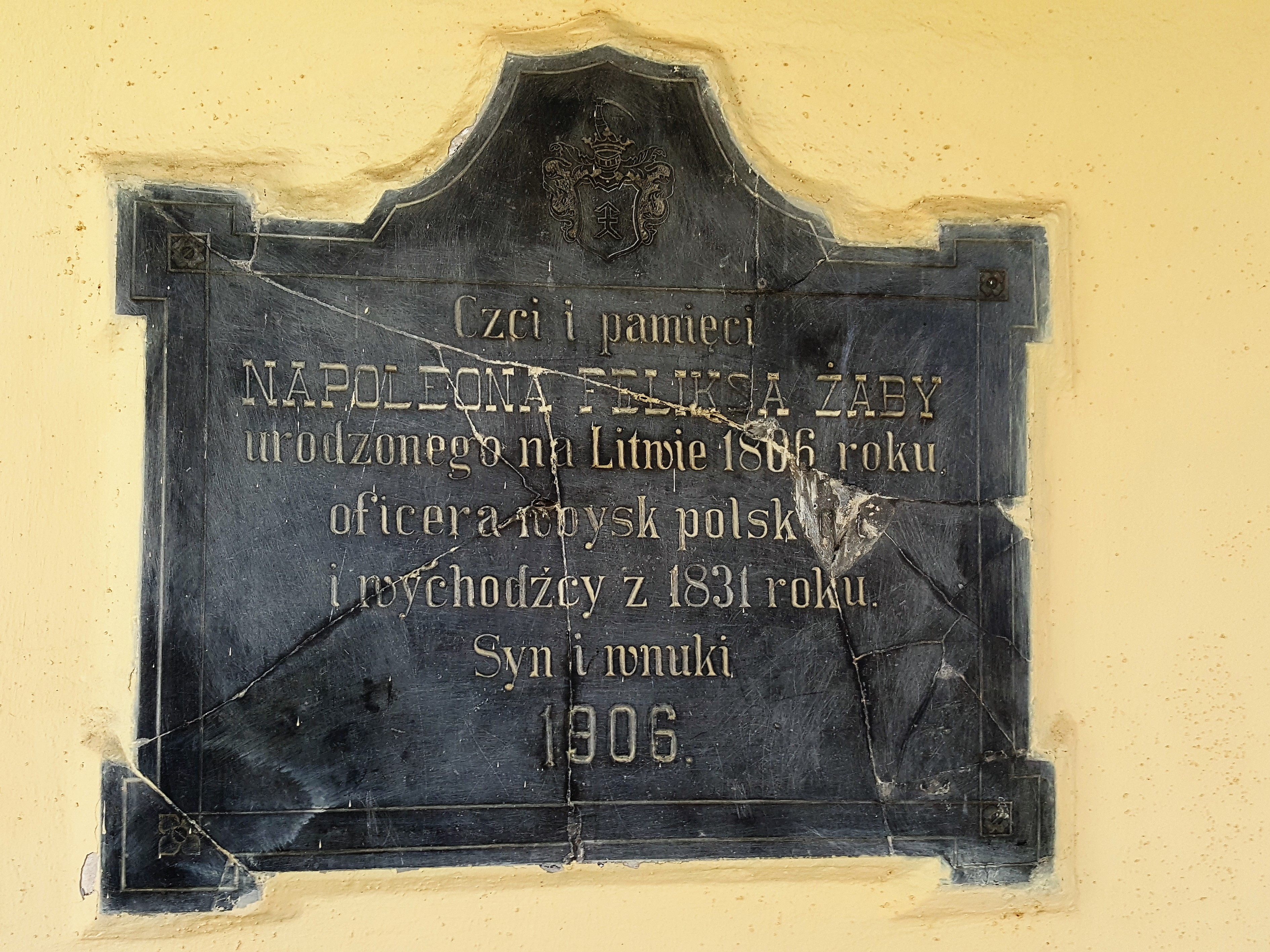 Zbylitowska Góra, Tablica pamiątkowa na fasadzie oranżerii (zespół dworski, XIX)